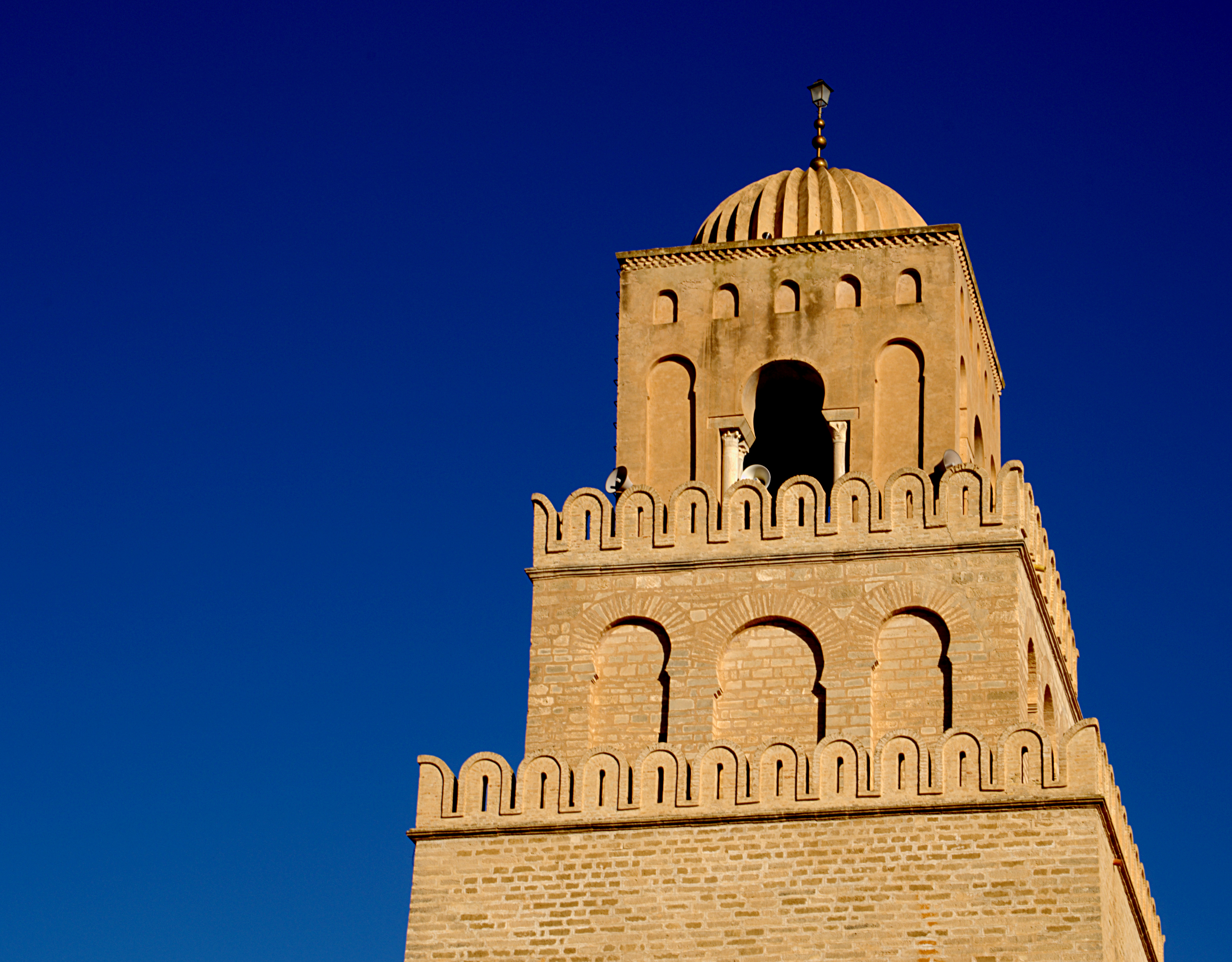 Grande Mosquée (Sidi Okba), Kairouan. Partie supérieure du minaret.